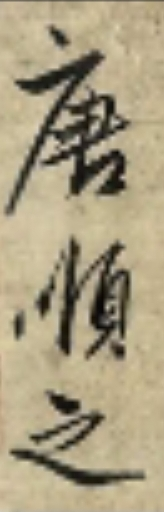 唐順之在其書法作品中之落款